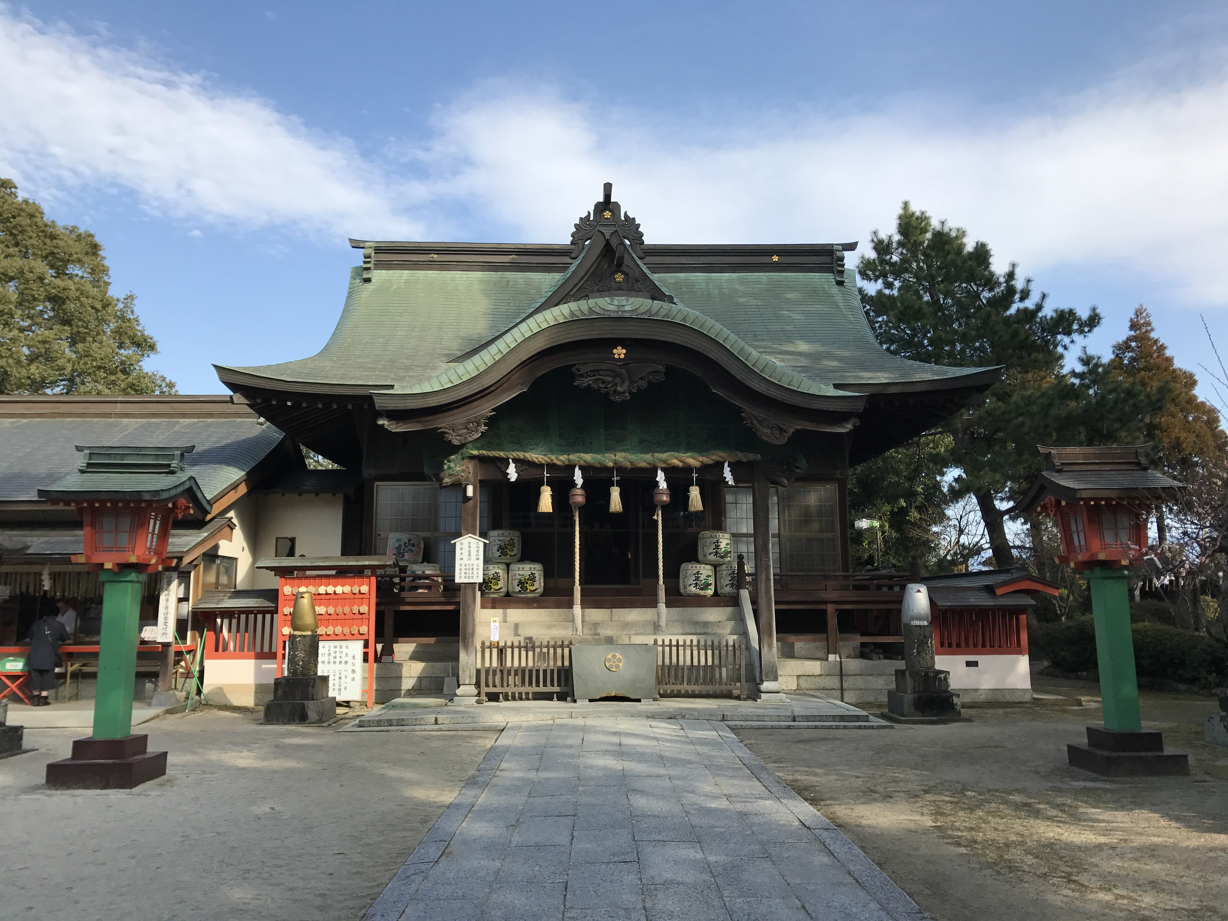 福岡県久留米市・北野天満宮の拝殿